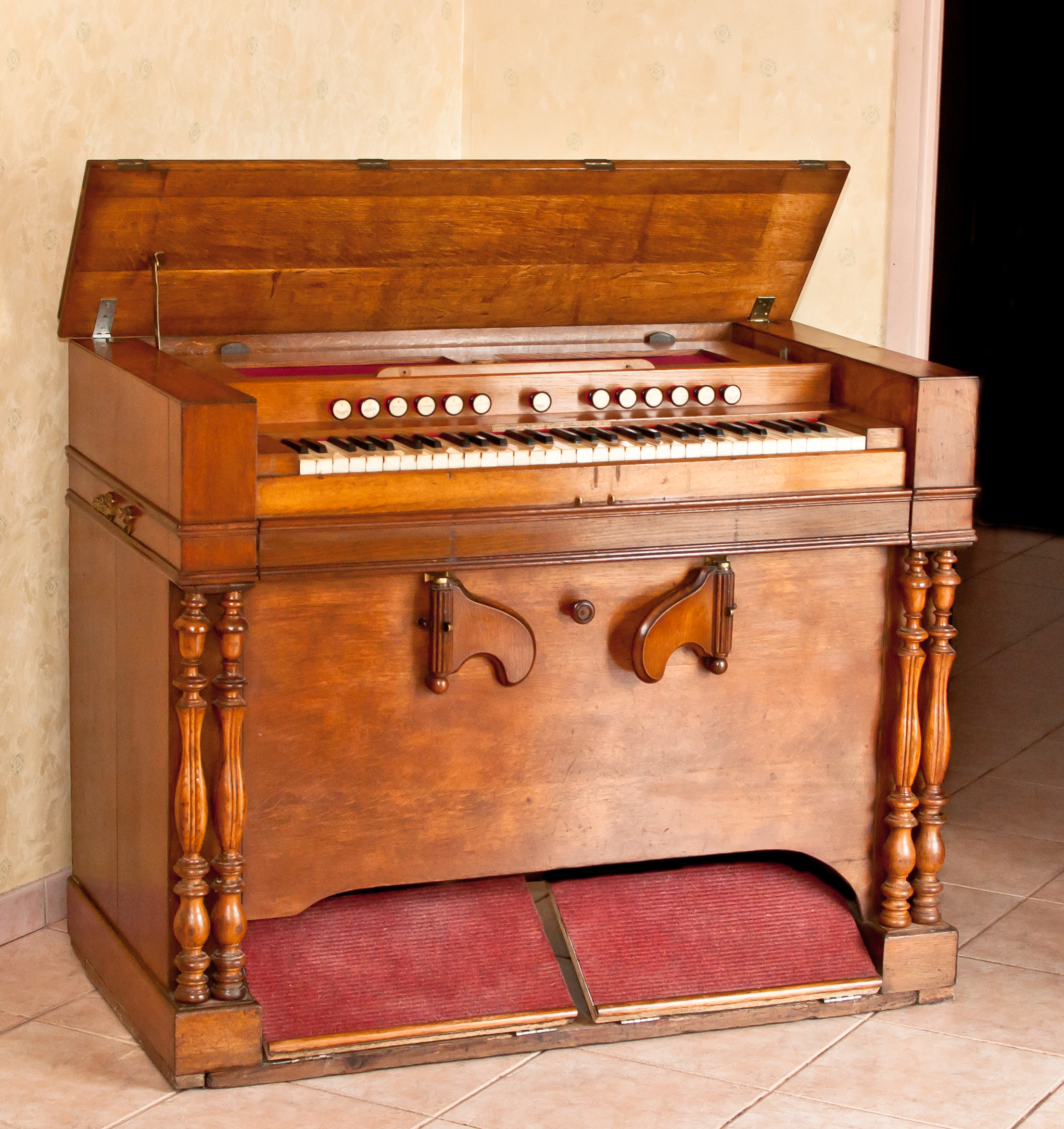 Harmonium Debain de 4 jeux, construit au environ de 1865. coll. particulière